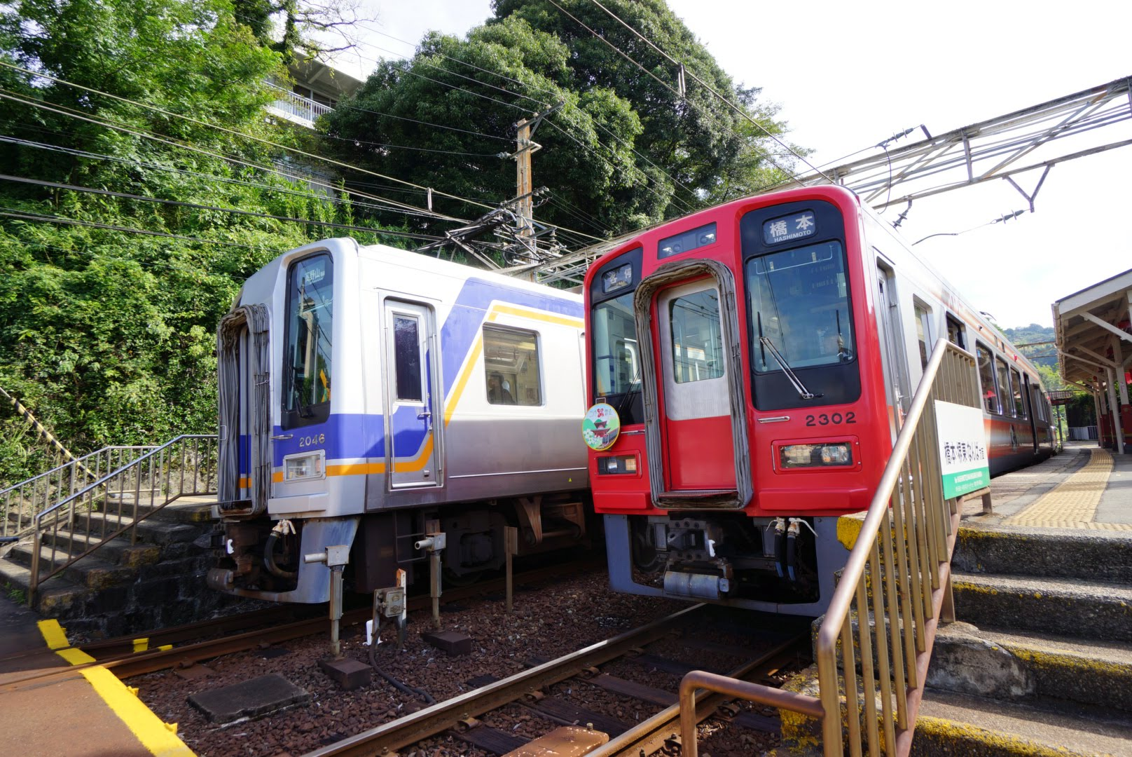 九度山駅で交換中の南海2300系と2000系